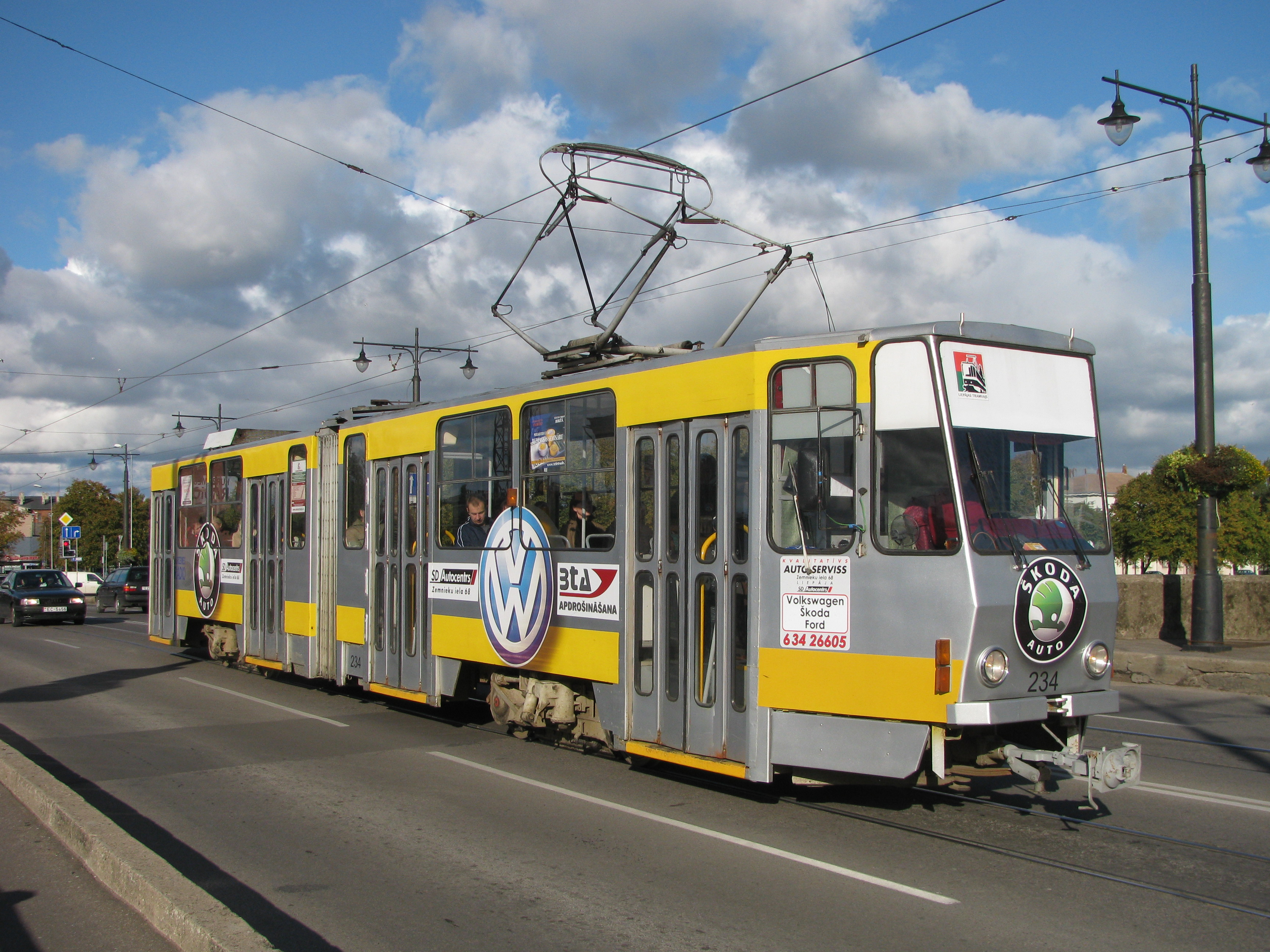 Tatra KT4 ev. č. 234, provozovatel Liepājas tramvajs